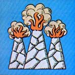 Isignia för F 1 Flygflottilj